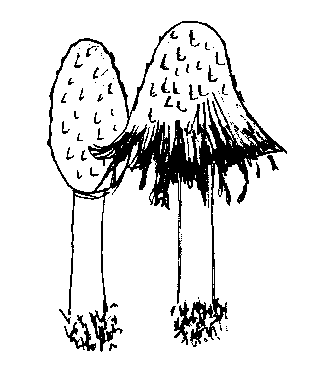 Coprinus comatus picture